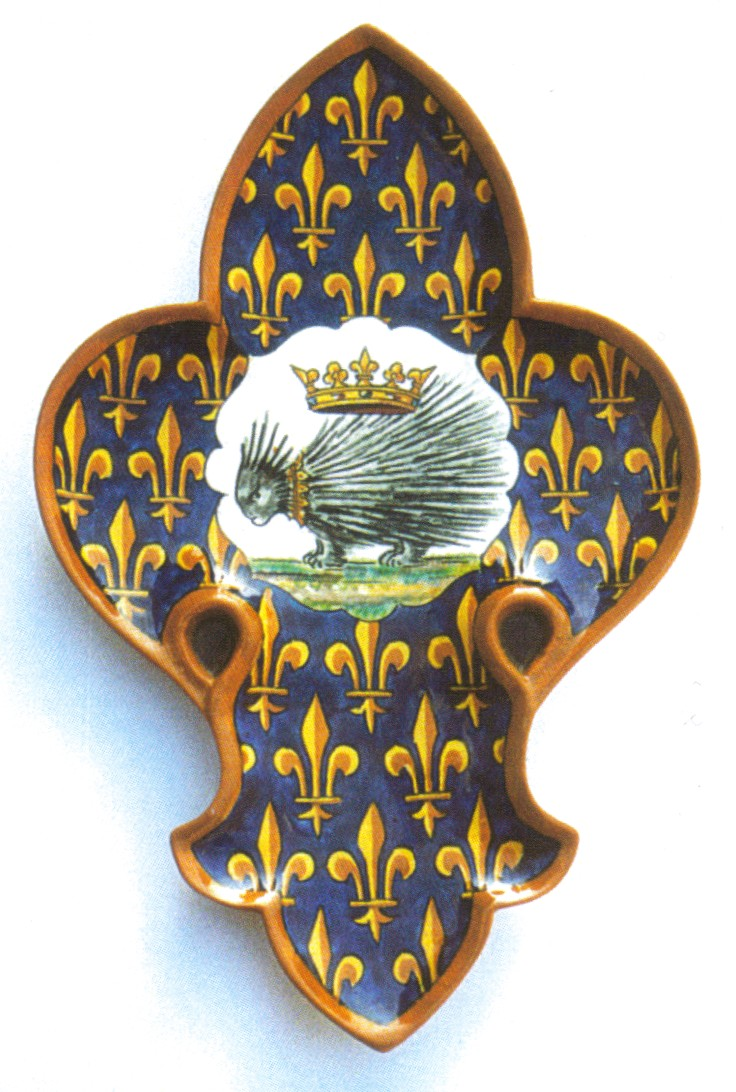 adrien thibault ceramique